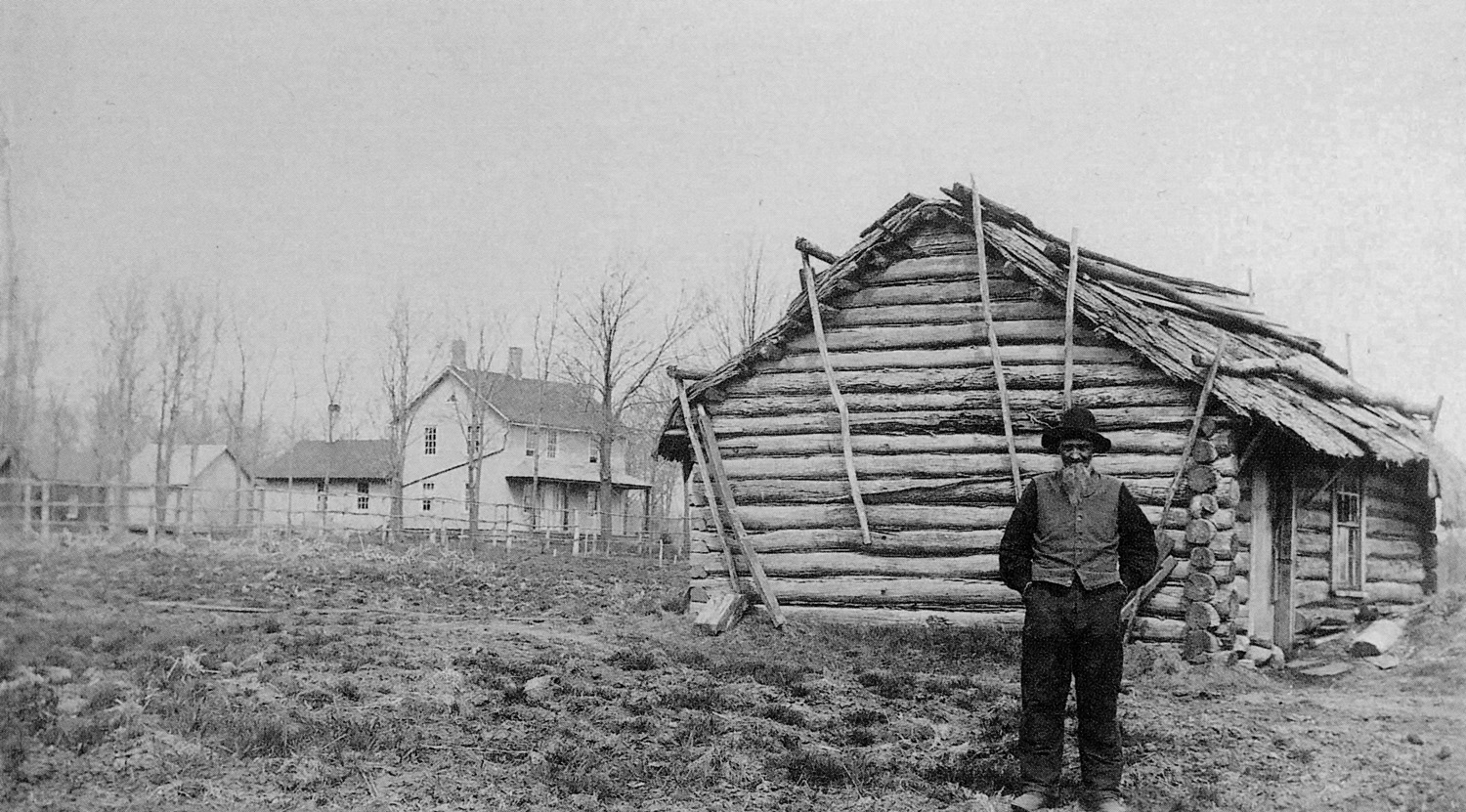 Andrew Peterson framför sin första "Shanty" i Minnesota. Kortet är taget 1885 och "Shantiet" byggdes 1855.